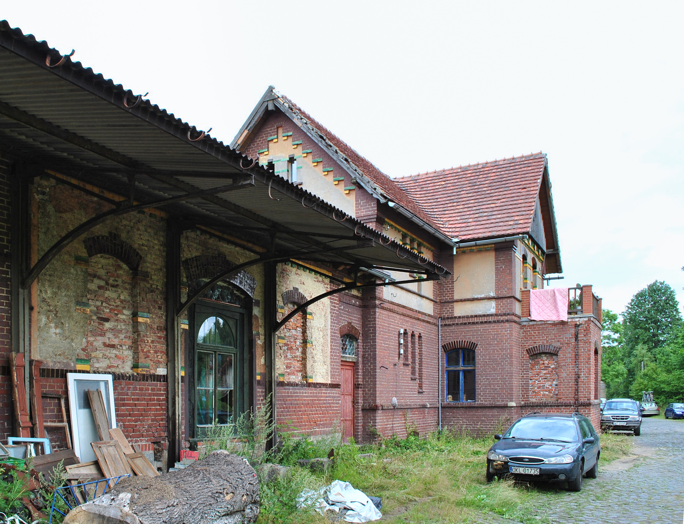 Budynek dworca kolejowego na dawnej stacji Pobiedna.